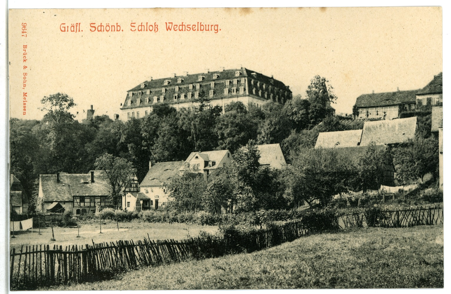 Wechselburg; Schloß This postcard is from publisher Brück & Sohn in Meißen ( postcard has a unique number 09647 and is available in a higher resolution at the publisher. This images was uploaded in a cooperation project between Wikipedians and the publisher.